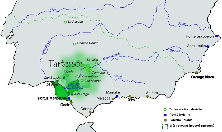 Mapa království Tartessiů